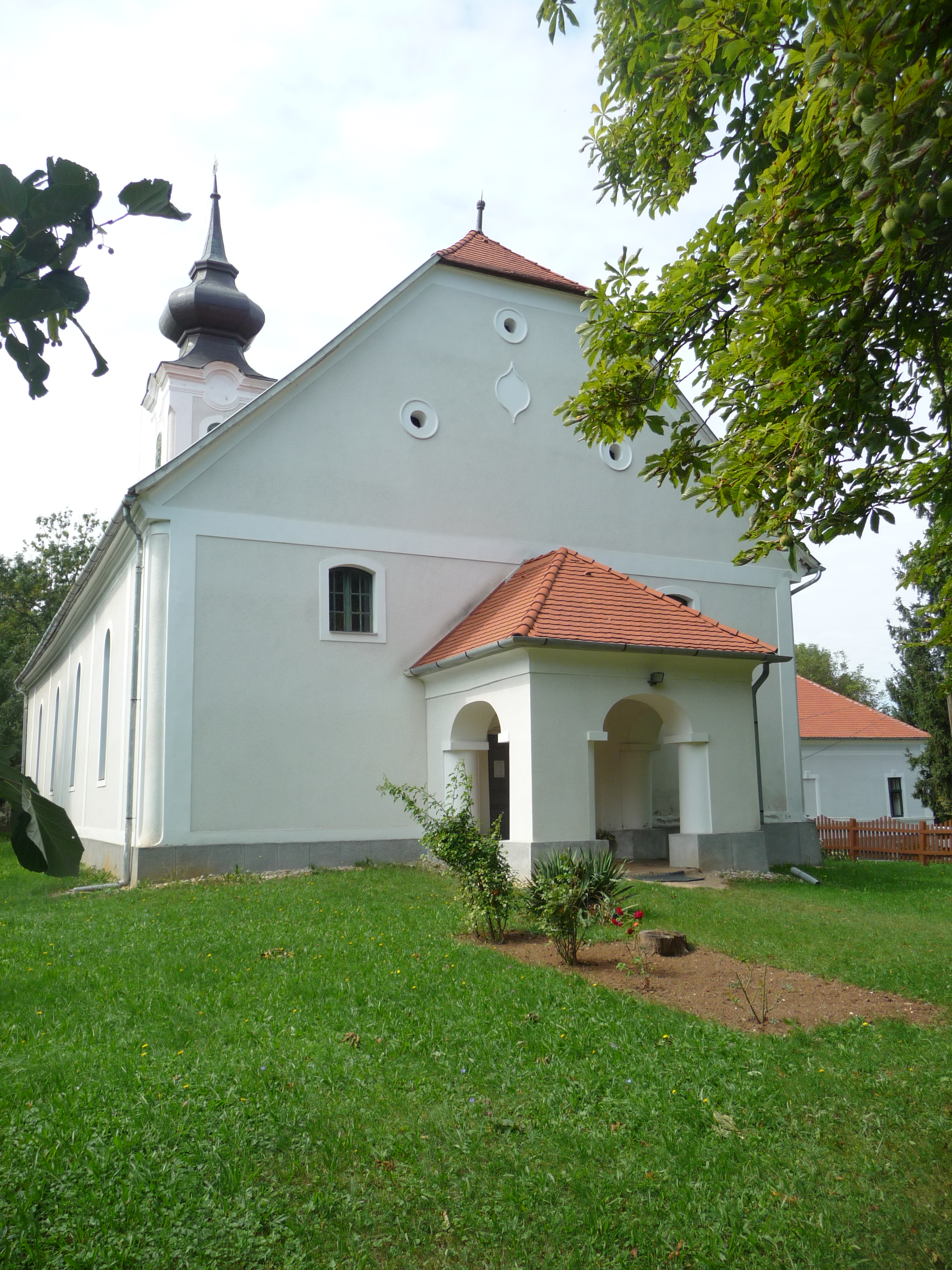 A szentgyörgyvölgyi református templom keleti bejárata